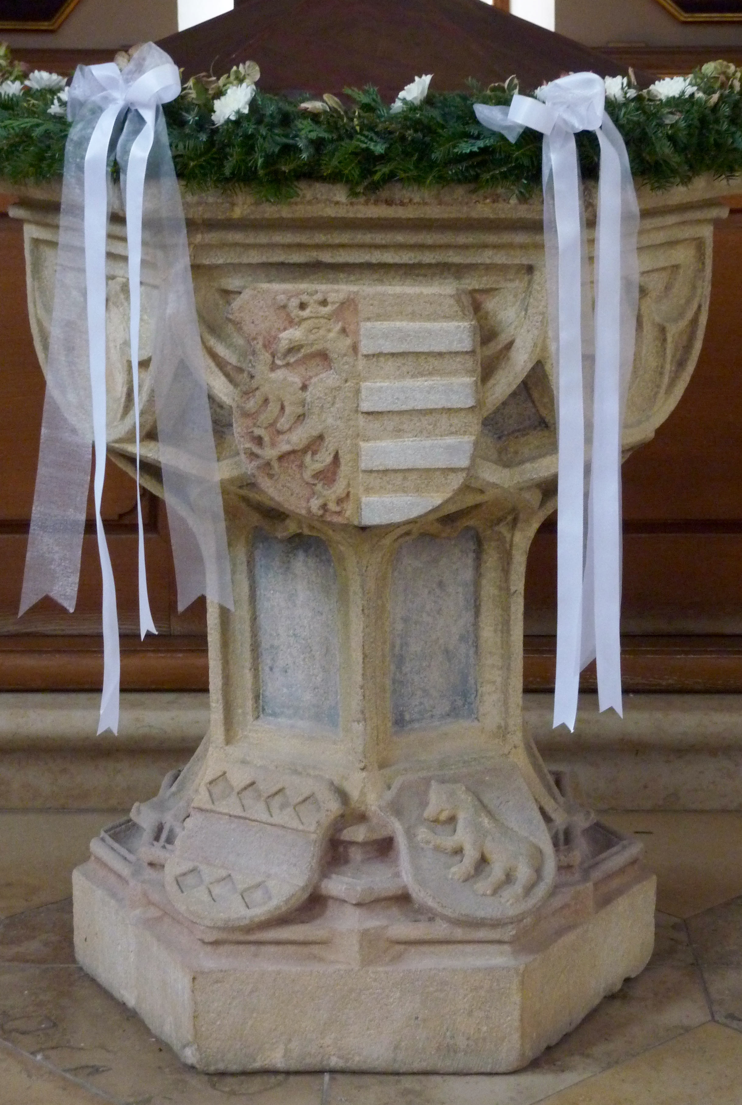 Ehemalige Damenstiftskirche, katholische Pfarrkirche St. Johannes Baptist und Johannes Evangelist in Edelstetten in der Gemeinde Neuburg an der Kammel im Landkreis Günzburg (Bayern), spätgotisches Taufbecken, um 1500, mit Stiftswappen und zwei kleineren Wappen